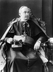 Cardinal Herbert Vaughan (1832-1903)